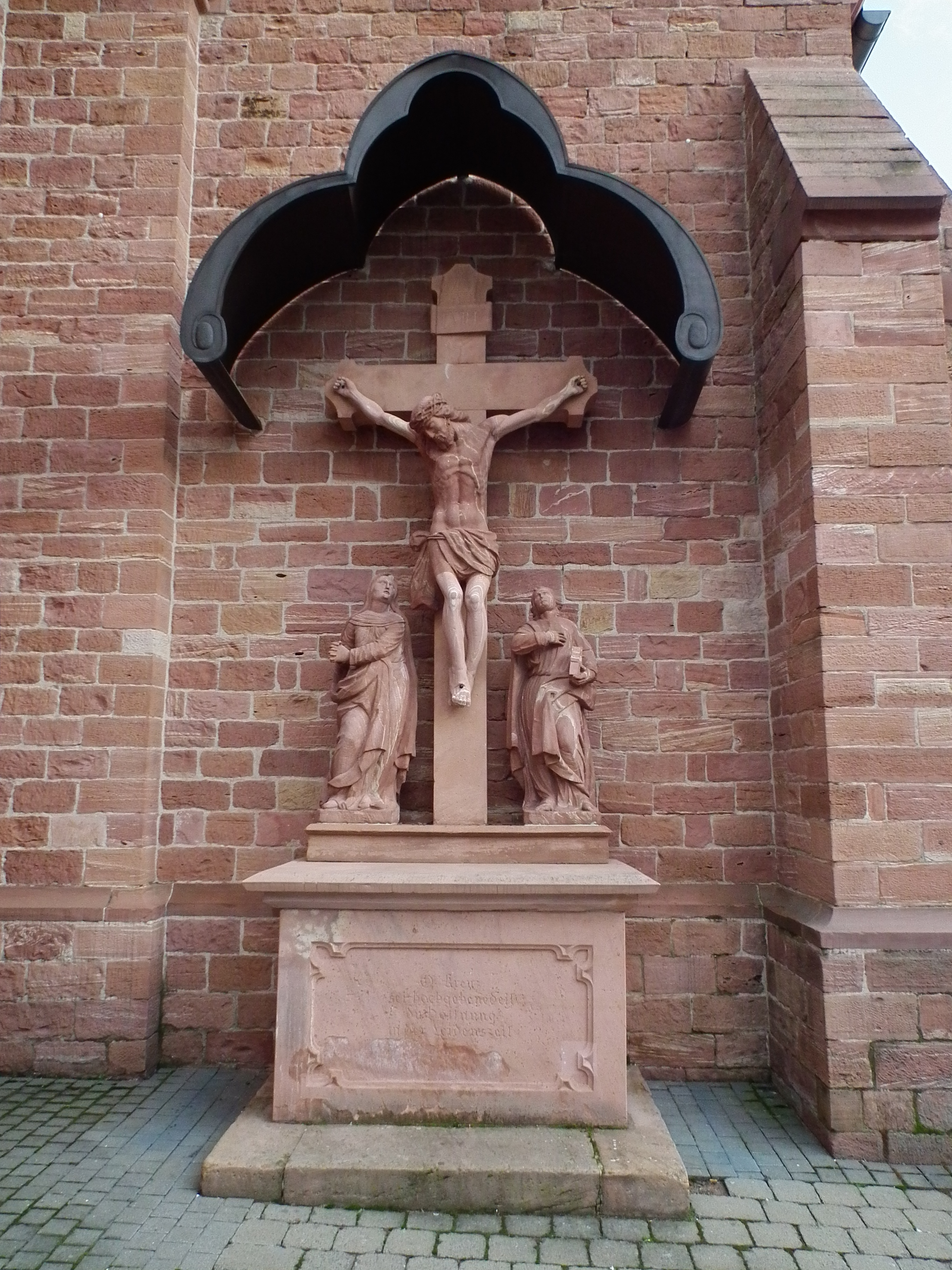 Kreuzigungsgruppe an der katholischen Kirche St. Nikolaus im Rodgauer Stadtteil Jügesheim (Hessen, Deutschland)